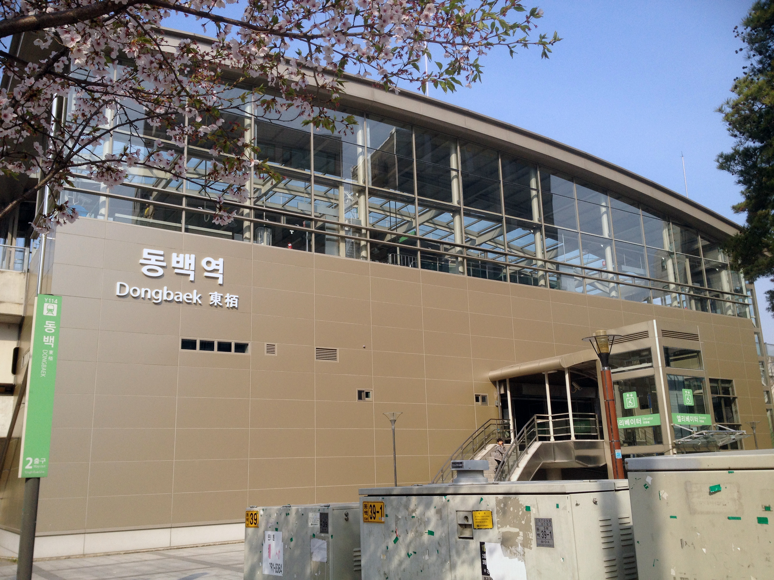 동백역 역사